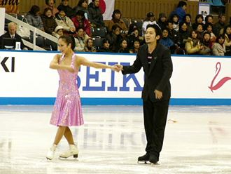 Nakako Tsuzuki & Kenji Miyamoto at the 2003 NHK Trophy.